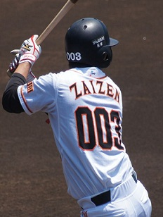 giants_zaizen_003